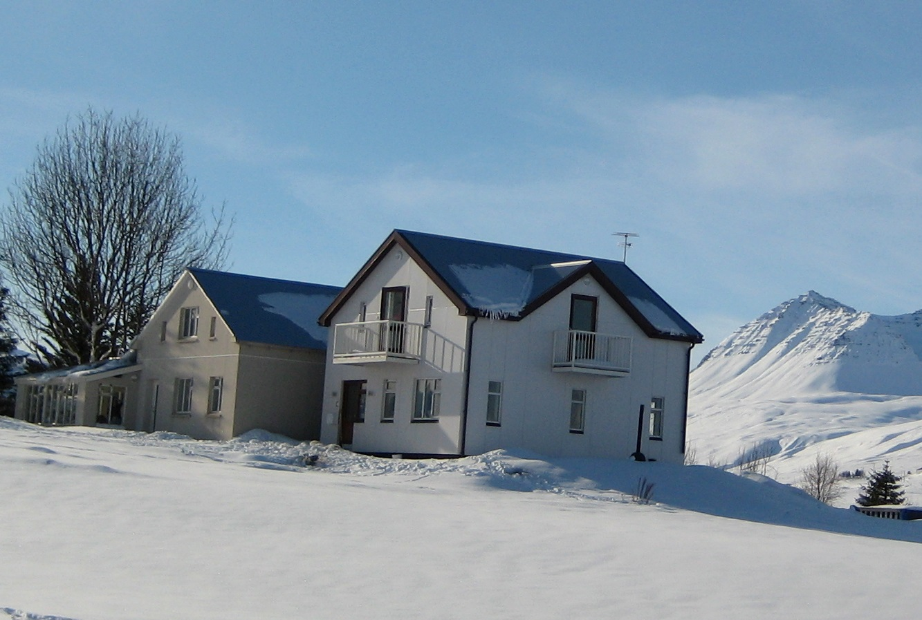 Melar í Svarfaðardal